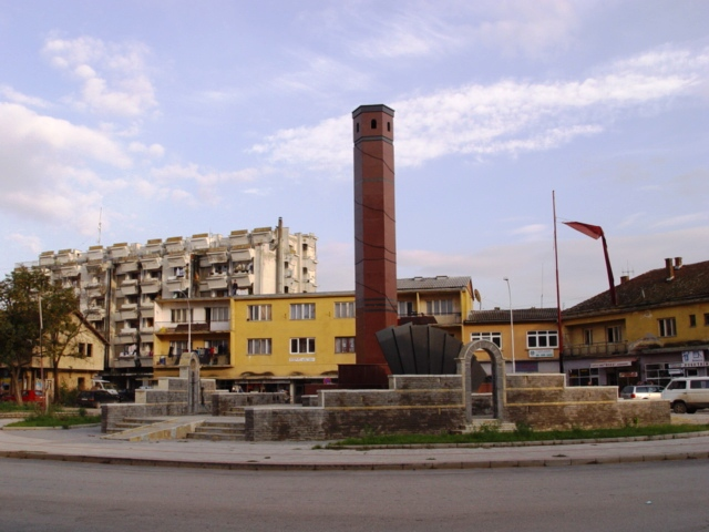 Qendra e Klines!